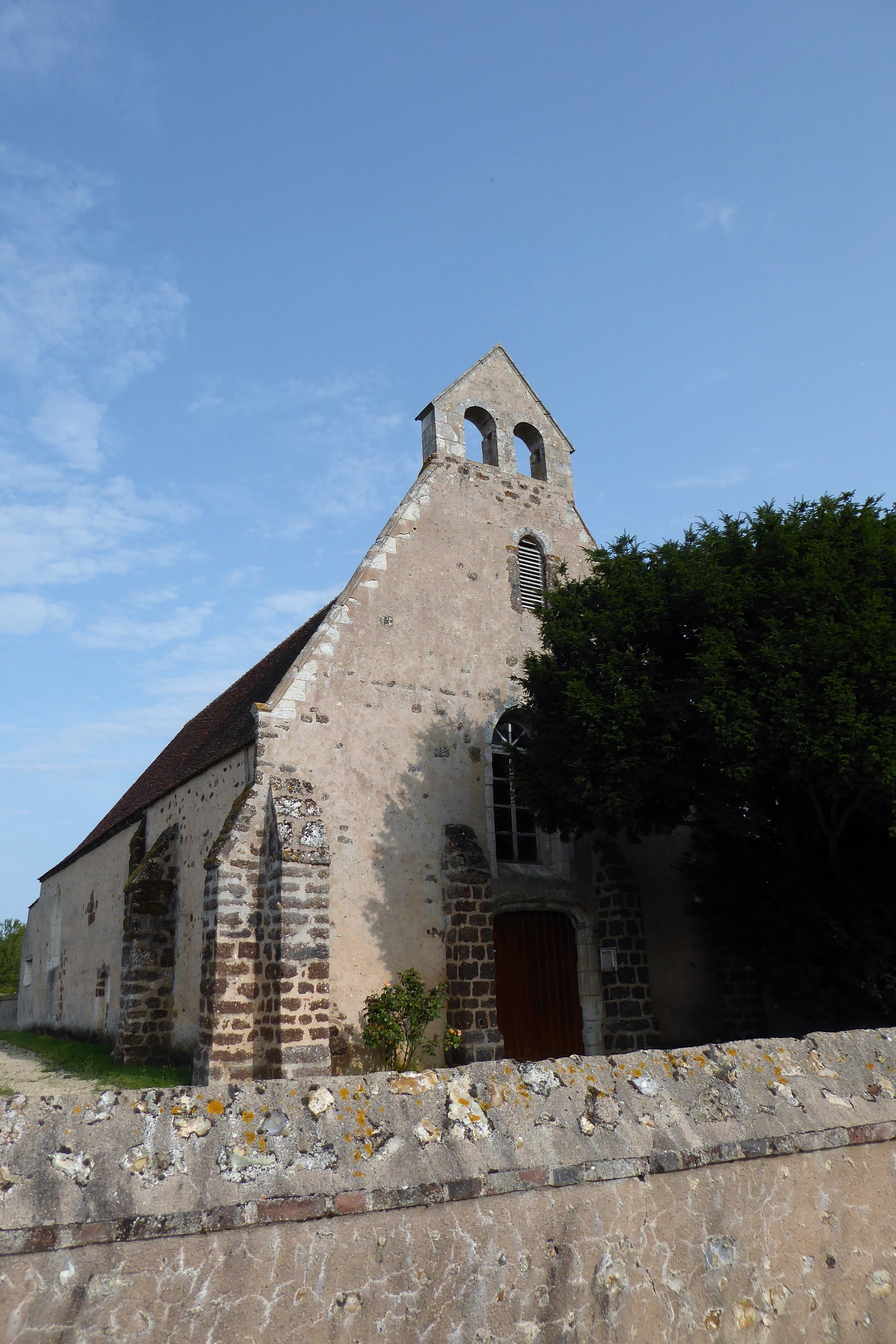 église Saint-Crépin, Cernay, Eure-et-Loir, France.